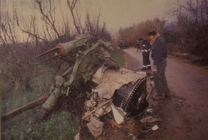 שאריות מסוק יסעור בסמוך לאתר ההתרסקות